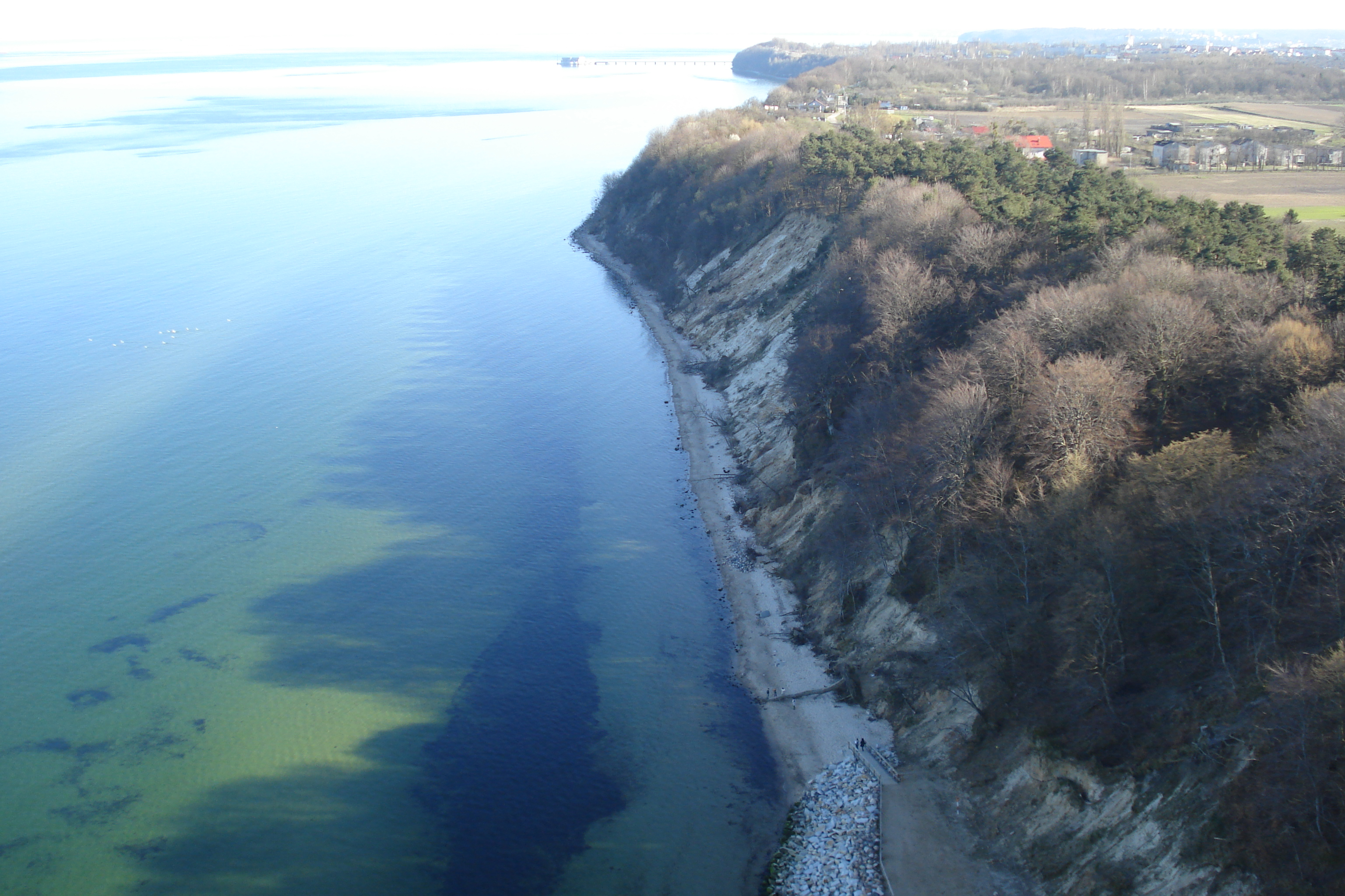 Gdynia z "lotu ptaka"